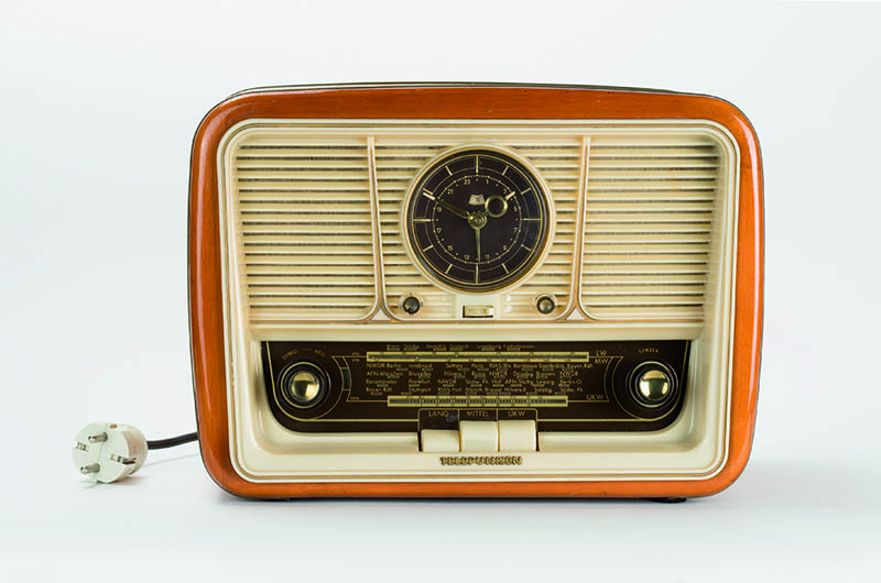 Radio Wecker oder Weckerradio Jubilate, Telefunken, Berlin, 1954, Deutsches Uhrenmuseum, Inv. 2007-105